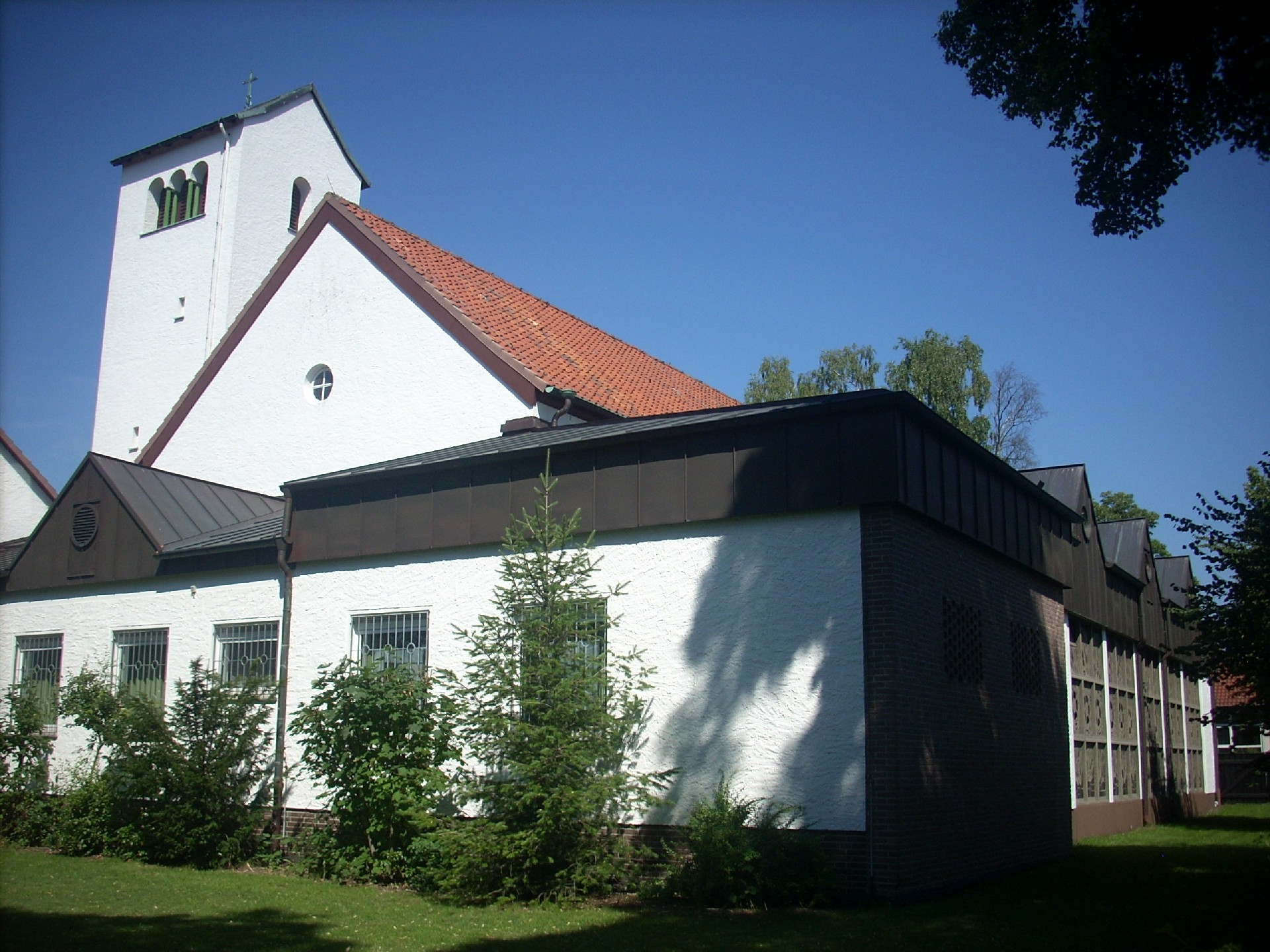 Burgdorf (Region Hannover), Kath. Kirche St. Nikolaus